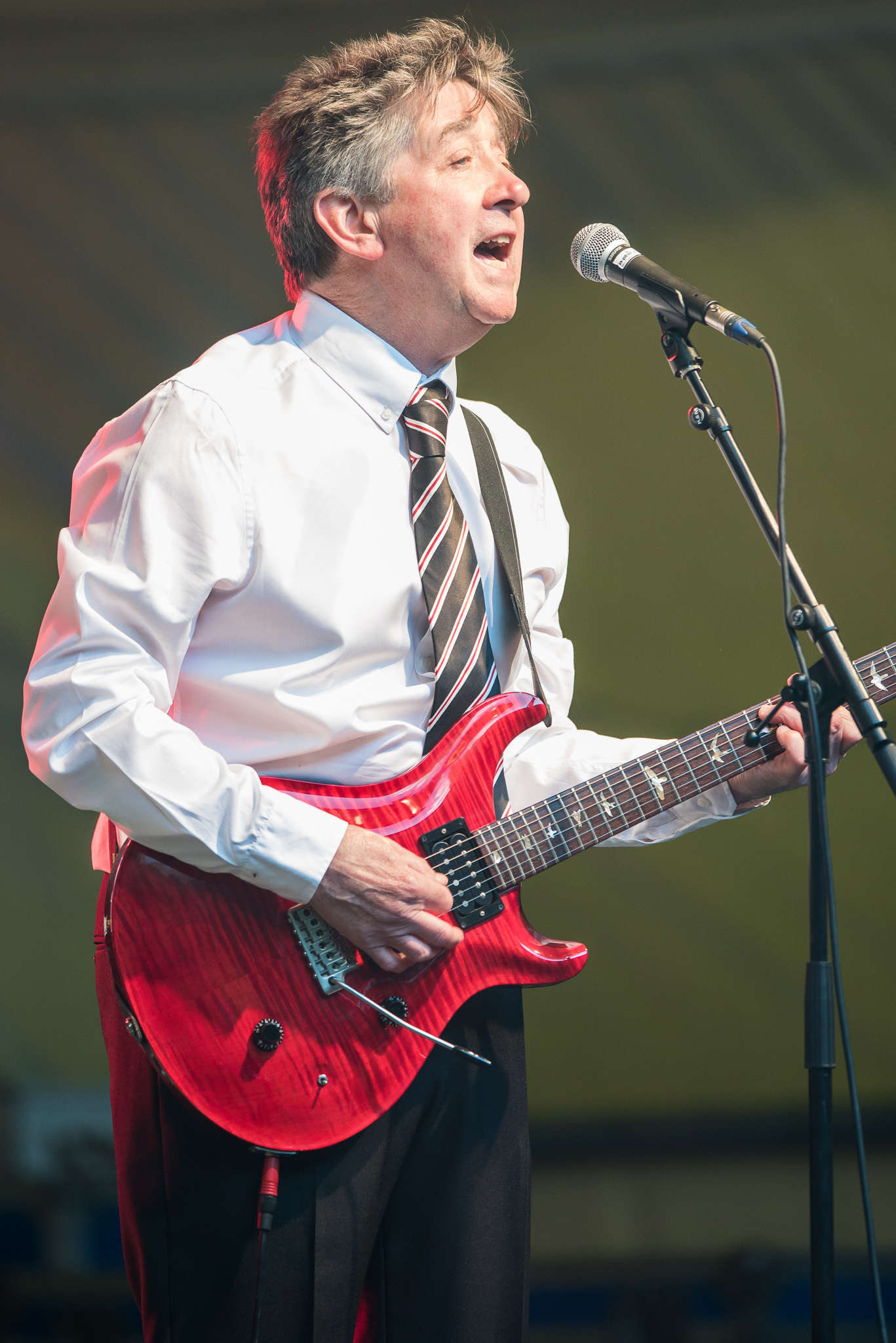 Concertbüro Franken,Konzert,Livekonzert,Livemusik,Musik,Serenadenhof,The Hollies,Tony Hicks